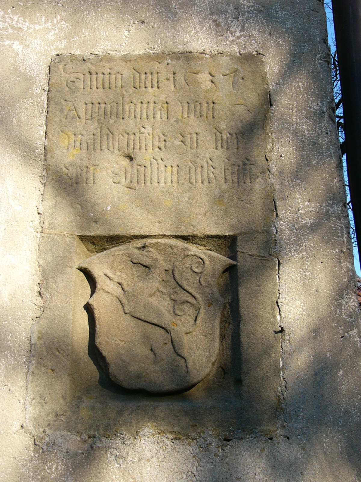 Inschrift zur Bautätigkeit der Äbtissin Apollonia von Waldenfels († 21. Februar 1543) am Kloster Himmelkron.